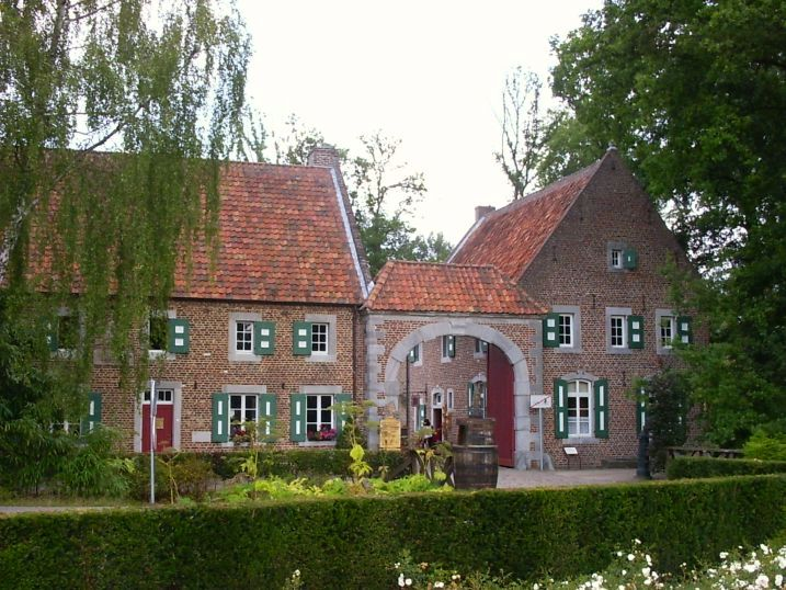 Een hoeve uit Heers, nu de ingang naar het museum. Bokrijk - eigen foto